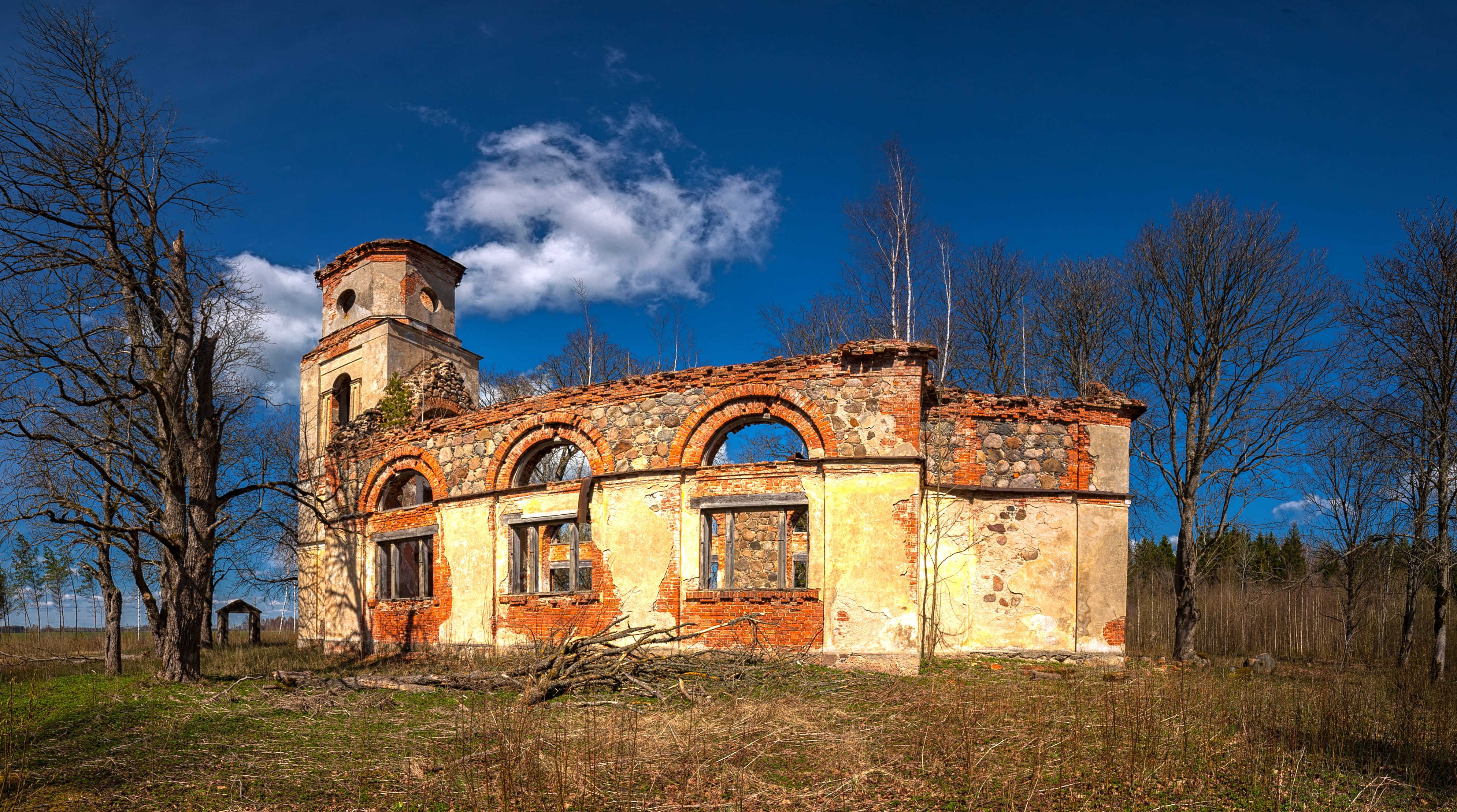 Rubas luterāņu baznīcas drupas